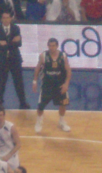 Hatzivrettas. PAO-EFES